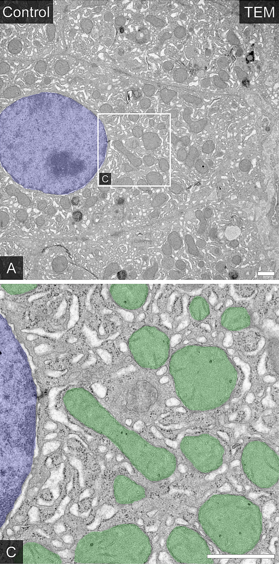 Fig. 2. La ultraestructura de la endomembrana en los hepatocitos del hígado de control. (A y C) Se identificaron hepatocitos típicos en las secciones ultrafinas del tejido de hígado de control embebido con Epon 812. A) El núcleo es de color azul. El área parcial indicada en A se fotografió adicionalmente con un aumento mayor en C. C) El núcleo es de color azul y las mitocondrias son de color verde. Barra de escala= 1 μm.